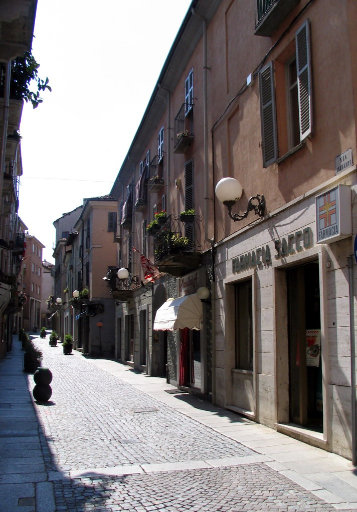 Asti, Rione S.Secondo entrata del ghetto Ebraico.